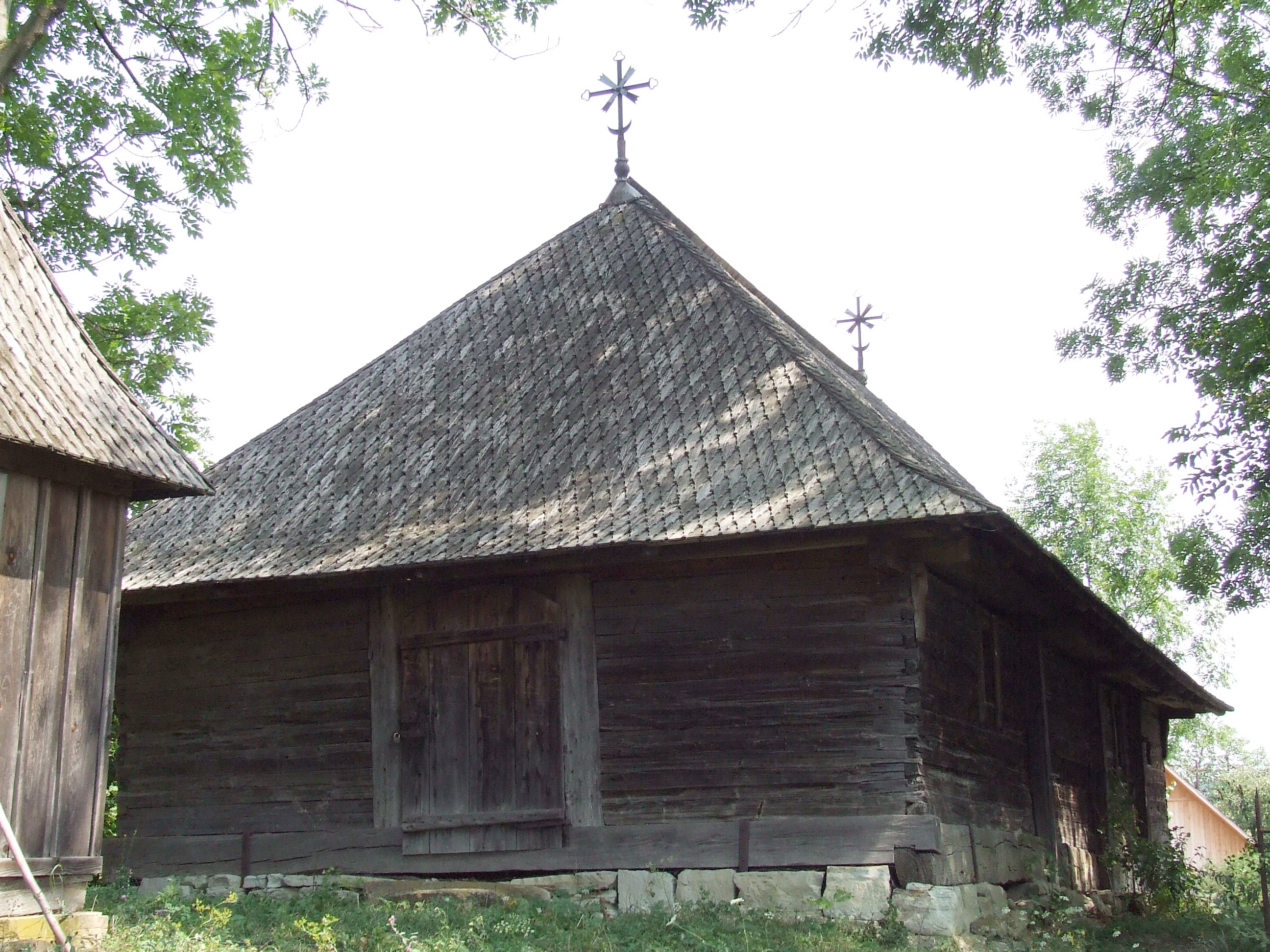 Biserica de lemn din Deag, cu hramul Sf. Arhangheli, judeţul Mureş.